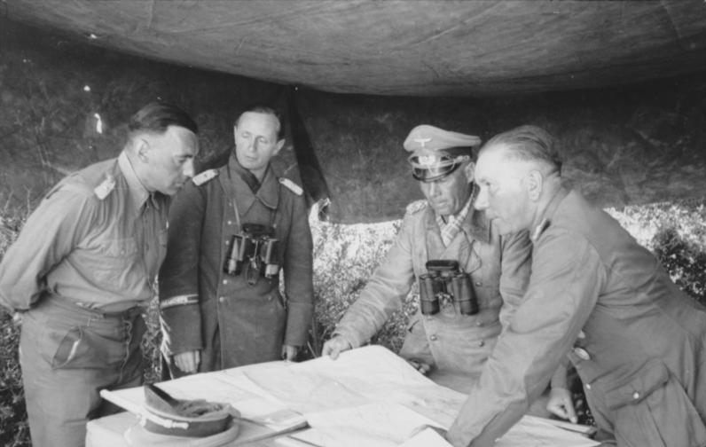 Im Hauptquartier von Rommel. Lagebesprechung vor dem Angriff auf Tobruk. Ganz rechts der Kommandierende General des "Afrikakorps", Generalleutnant Nehring, links Oberstleutnant Bayerlein. April 1942 26.5.42 [Herausgabedatum]